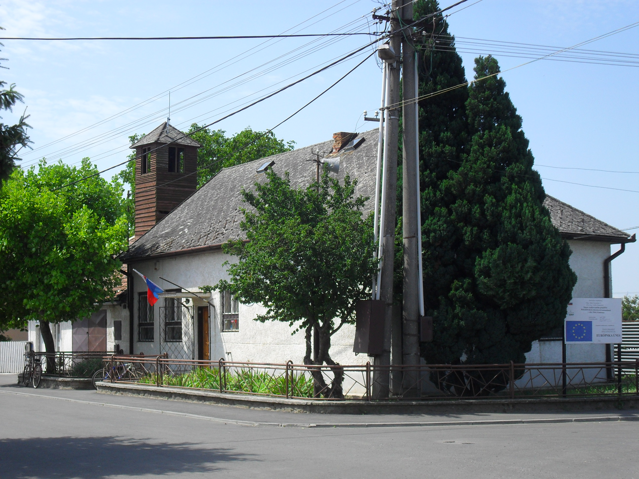 Kiskövesd - községi hivatal